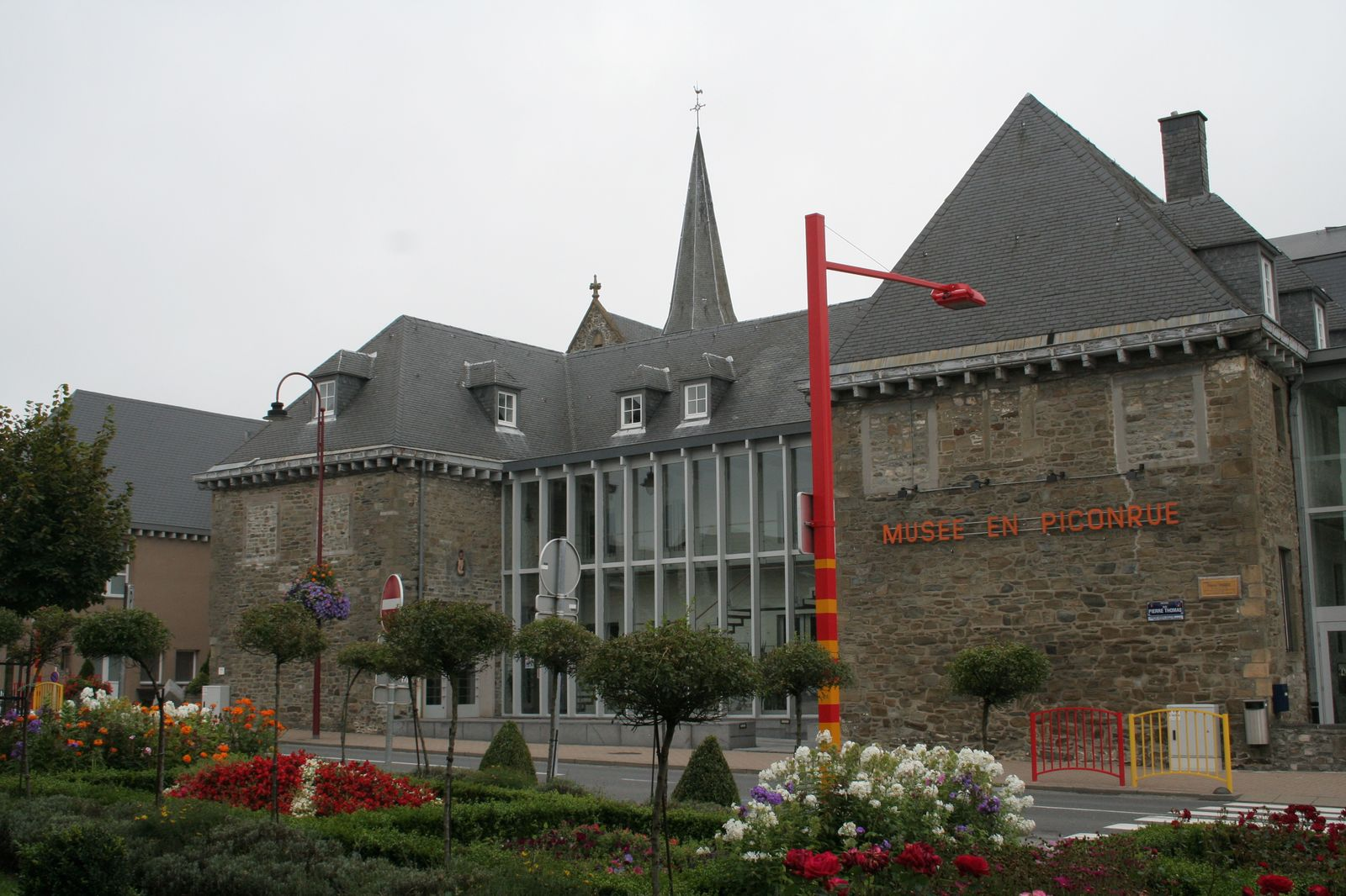 Le Musée en Piconrue (Bastogne) . Photo août 2008.